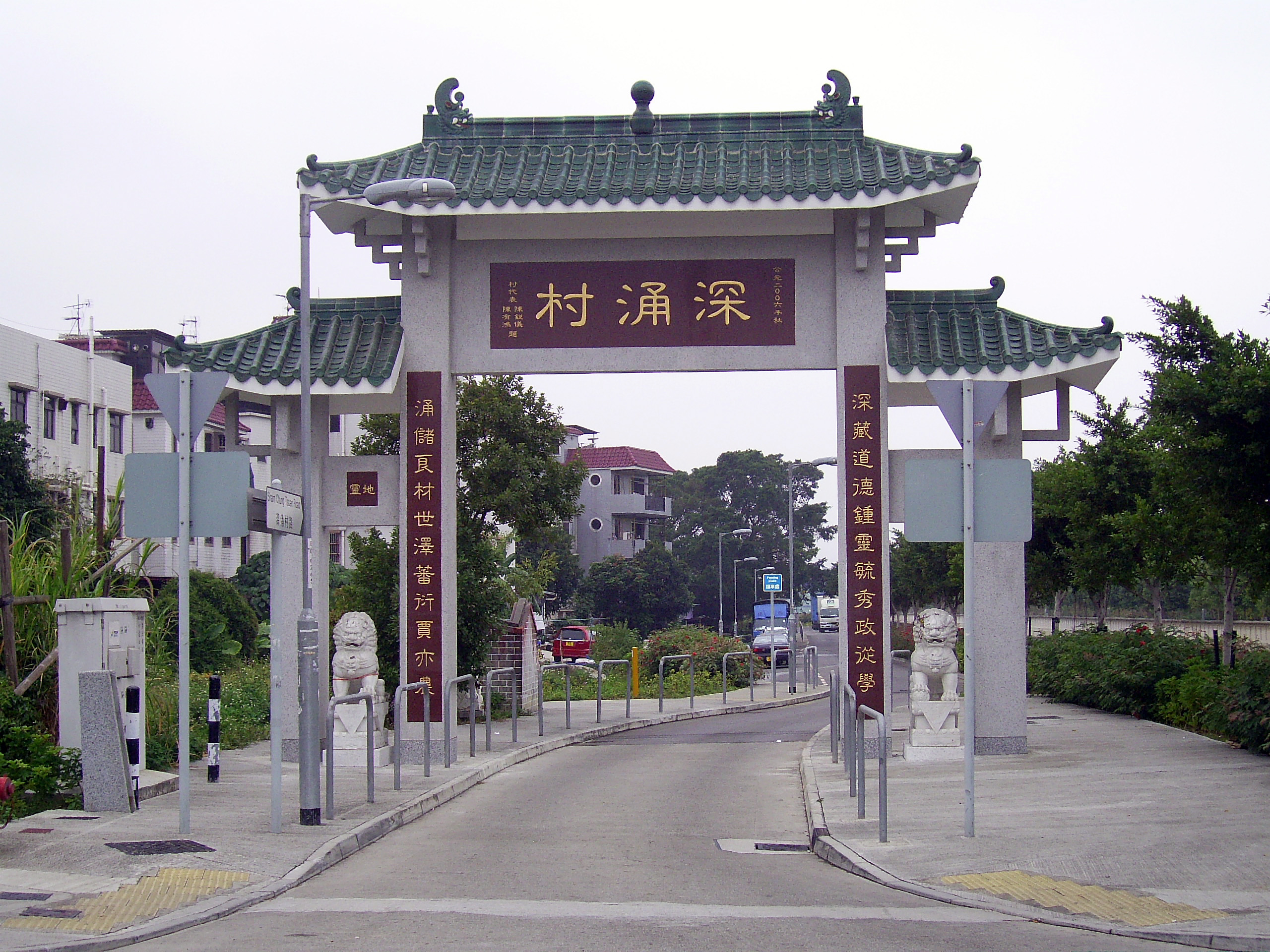 中文（香港）: 深涌村牌樓